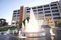 foto